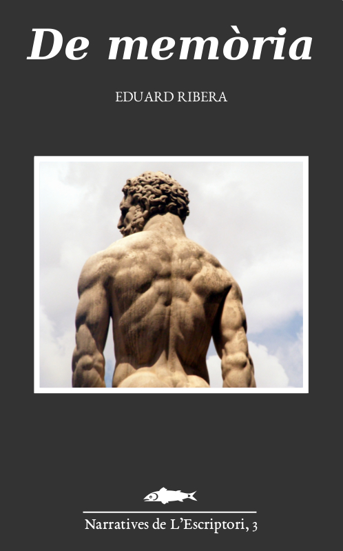 Coberta del llibre "De memòria" (2016) d'Eduard Ribera